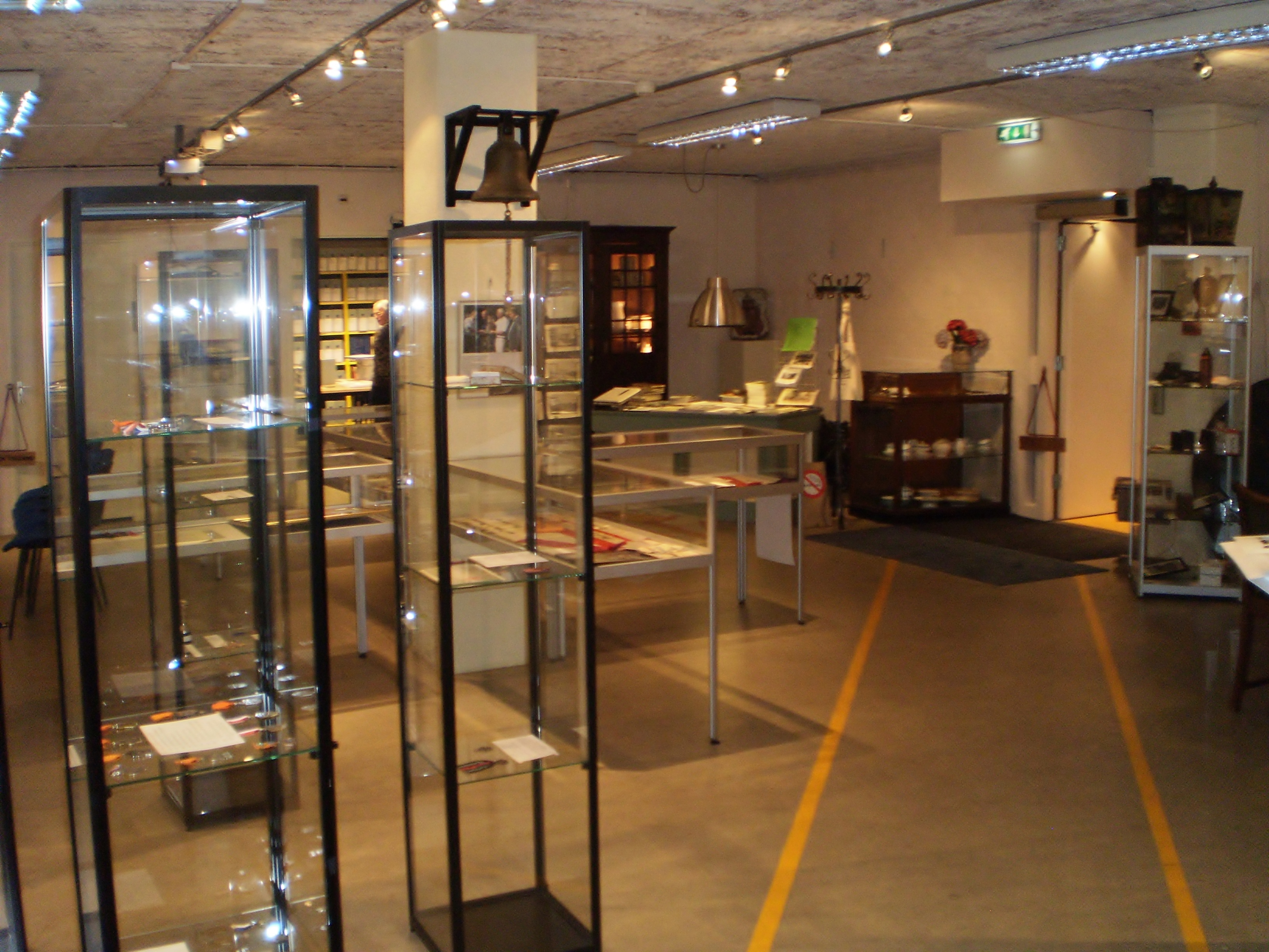 Deel van de vitrinekasten tijdens de tentoonstelling 'Ere wie Ere toekomt'